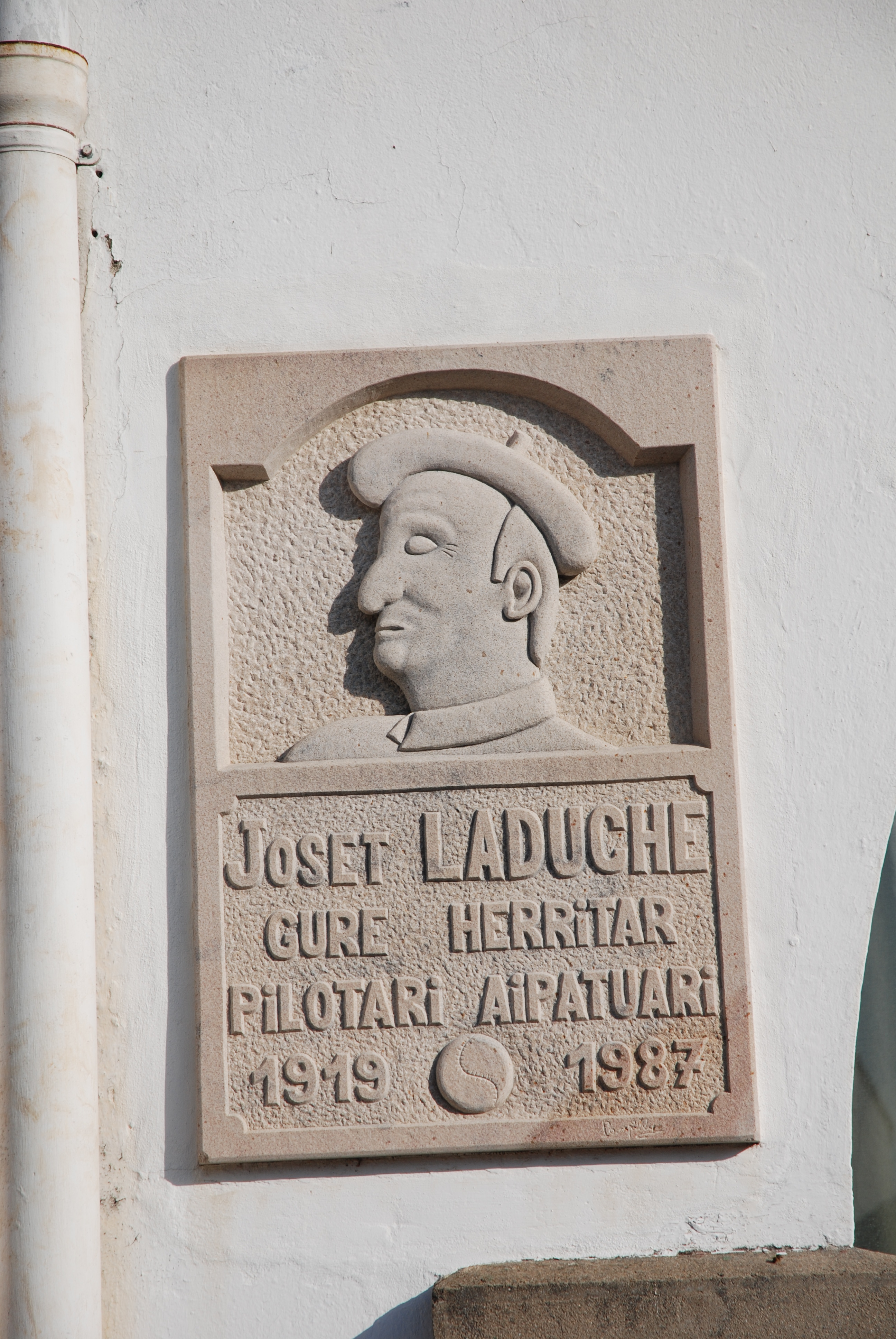 Ascain, plaque commémorative Joset Laduche, pelotari